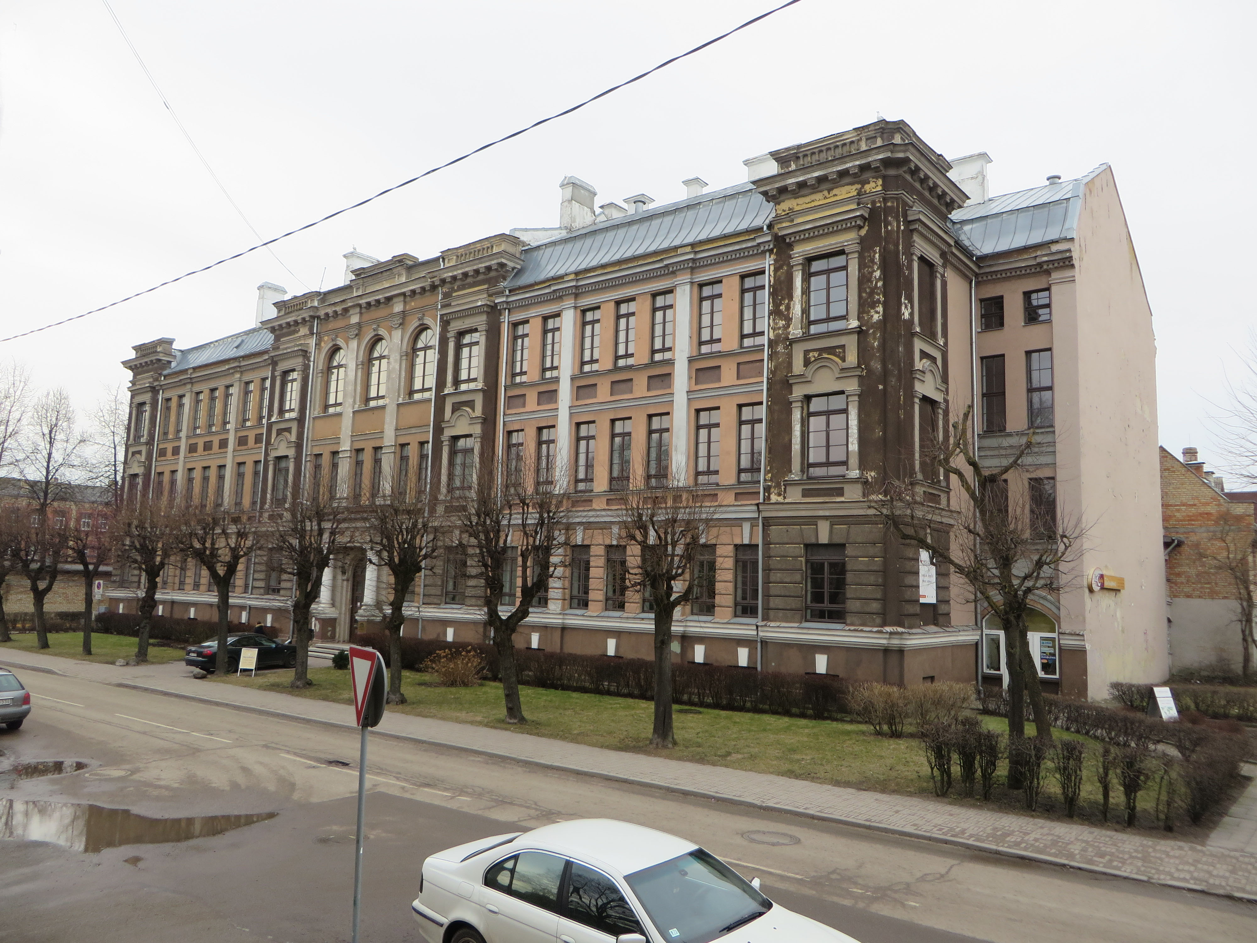 Jelgavas reālskola, Jelgava, Svētes iela 18